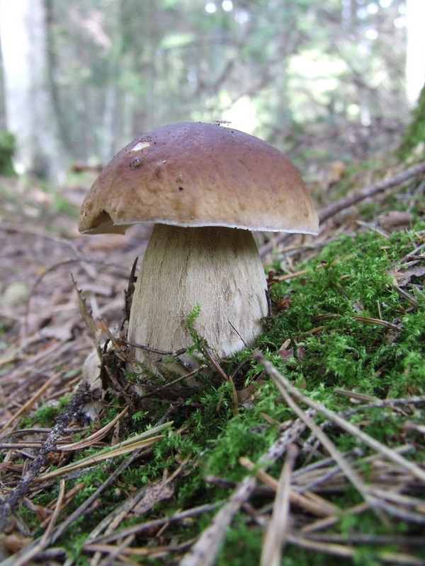 Boletus edulis. Karmėlava forest, Lithuania.